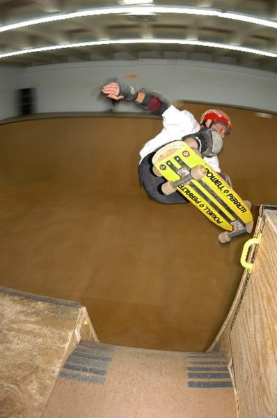 Alan "Ollie" Gelfand maakt een ollie over een canyon-ramp